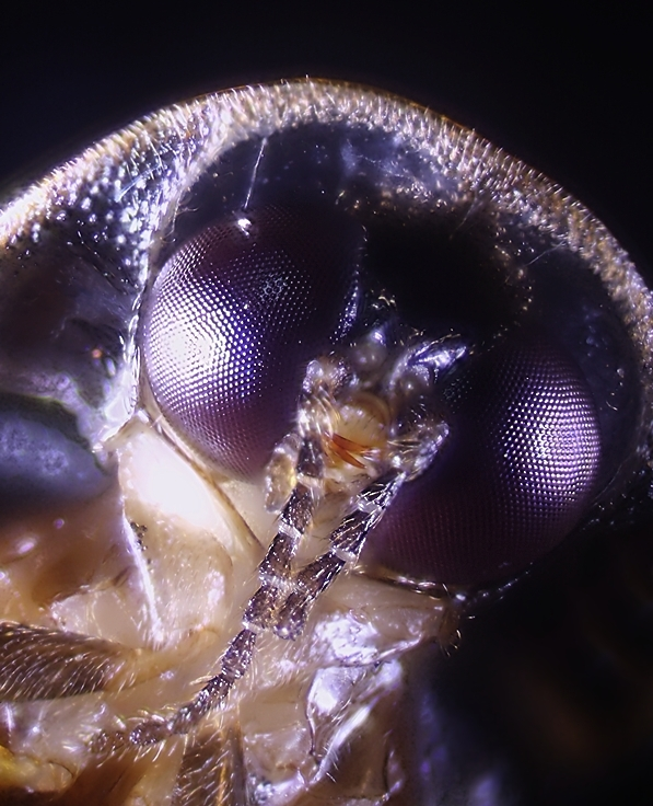 Lampyris noctiluca, male, samiec